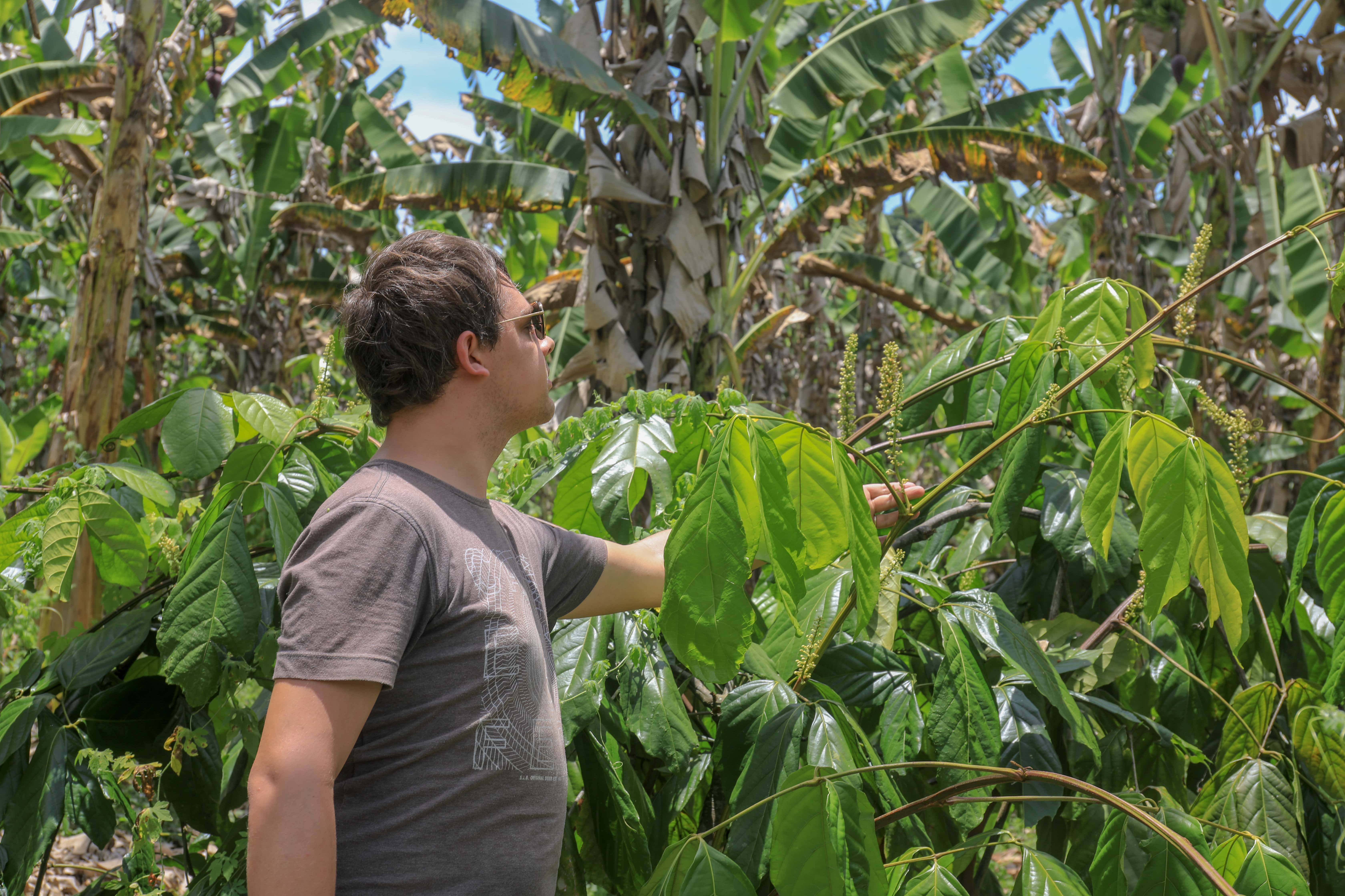 Visite d'une plantation de guarana au Brésil par Arnaud